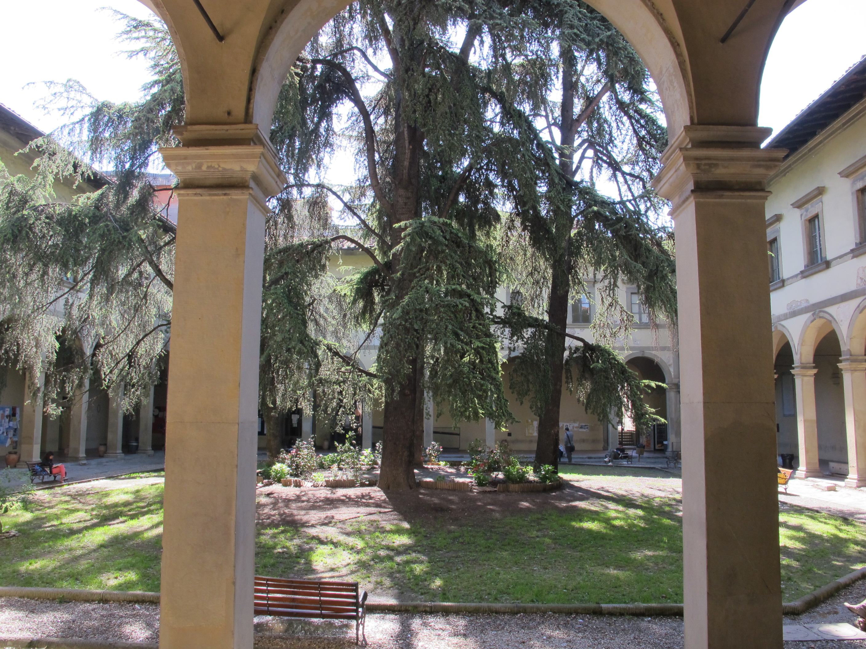 Sm. angeli, chiostro grande